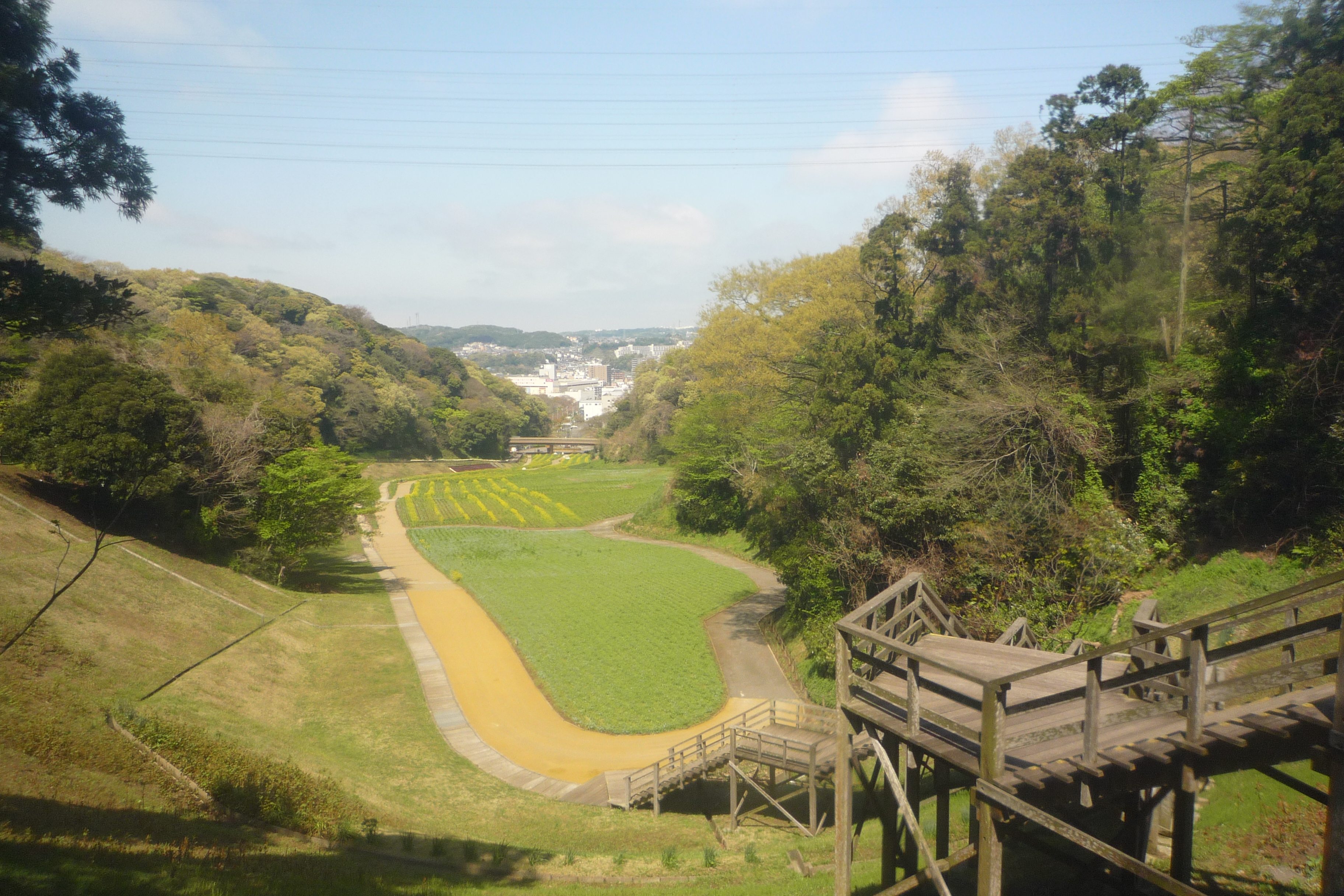 上から撮影した菜の花畑